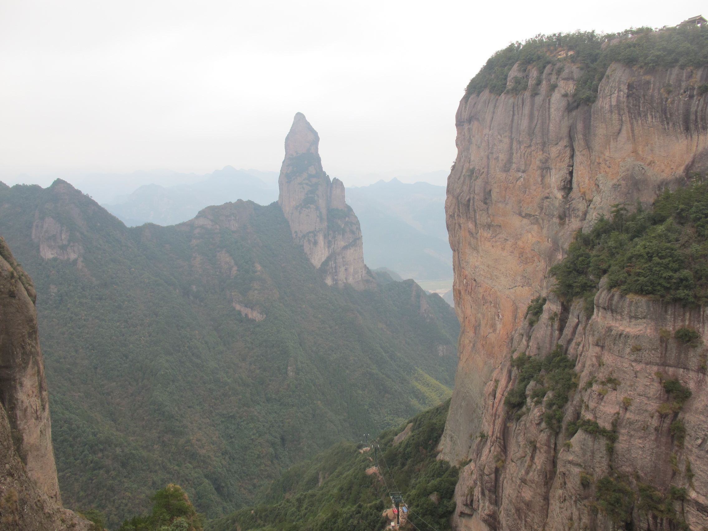 大神仙居风光